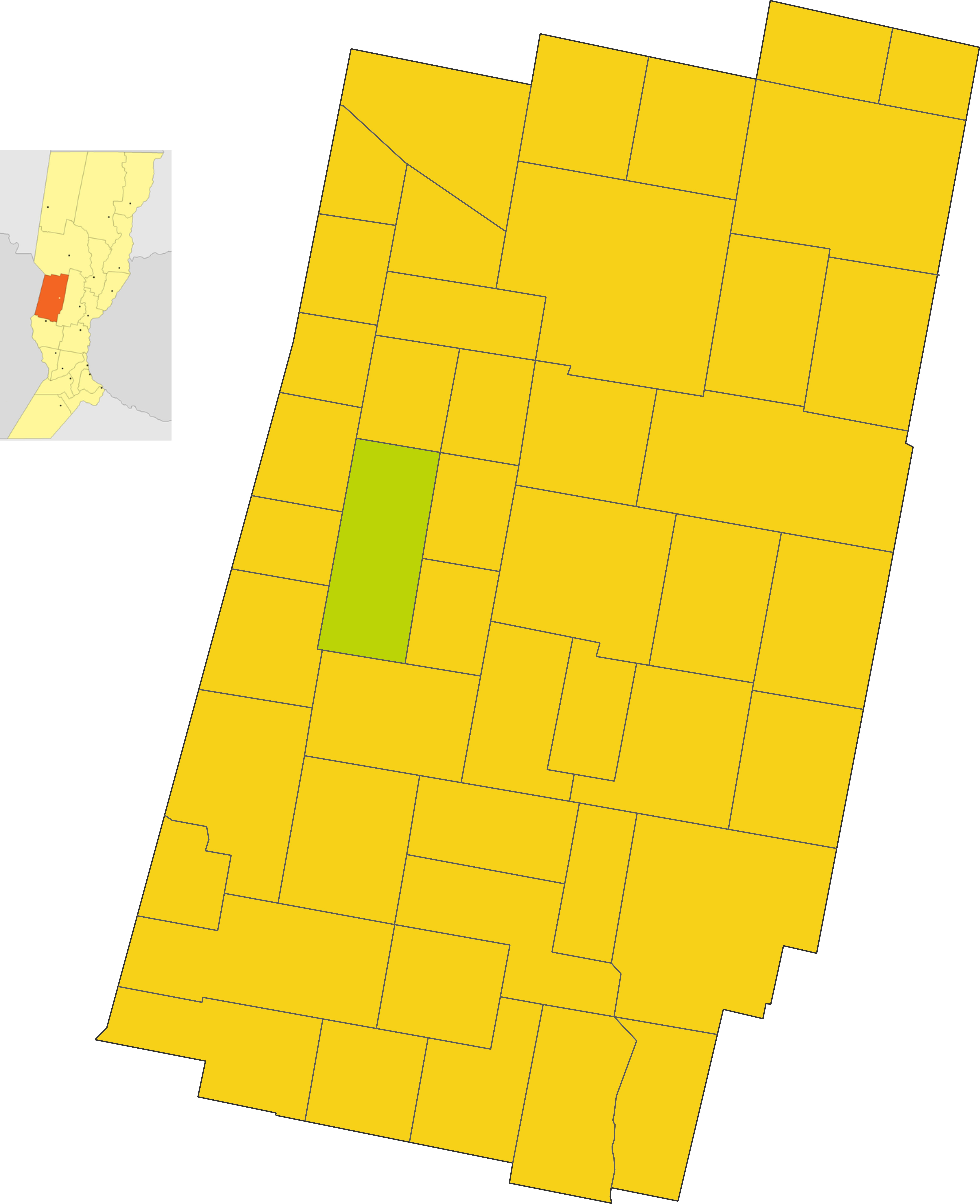 Map of the comuna de Vila in Castellanos department, Santa Fe province, Argentina